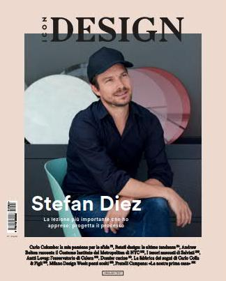 Copertina della rivista Icon Design maggio 2017, Arnoldo Mondadori Editore.